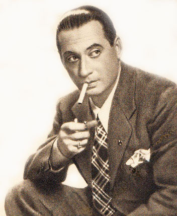 Una foto giovanile (anni Trenta) dell'attore Nino Besozzi